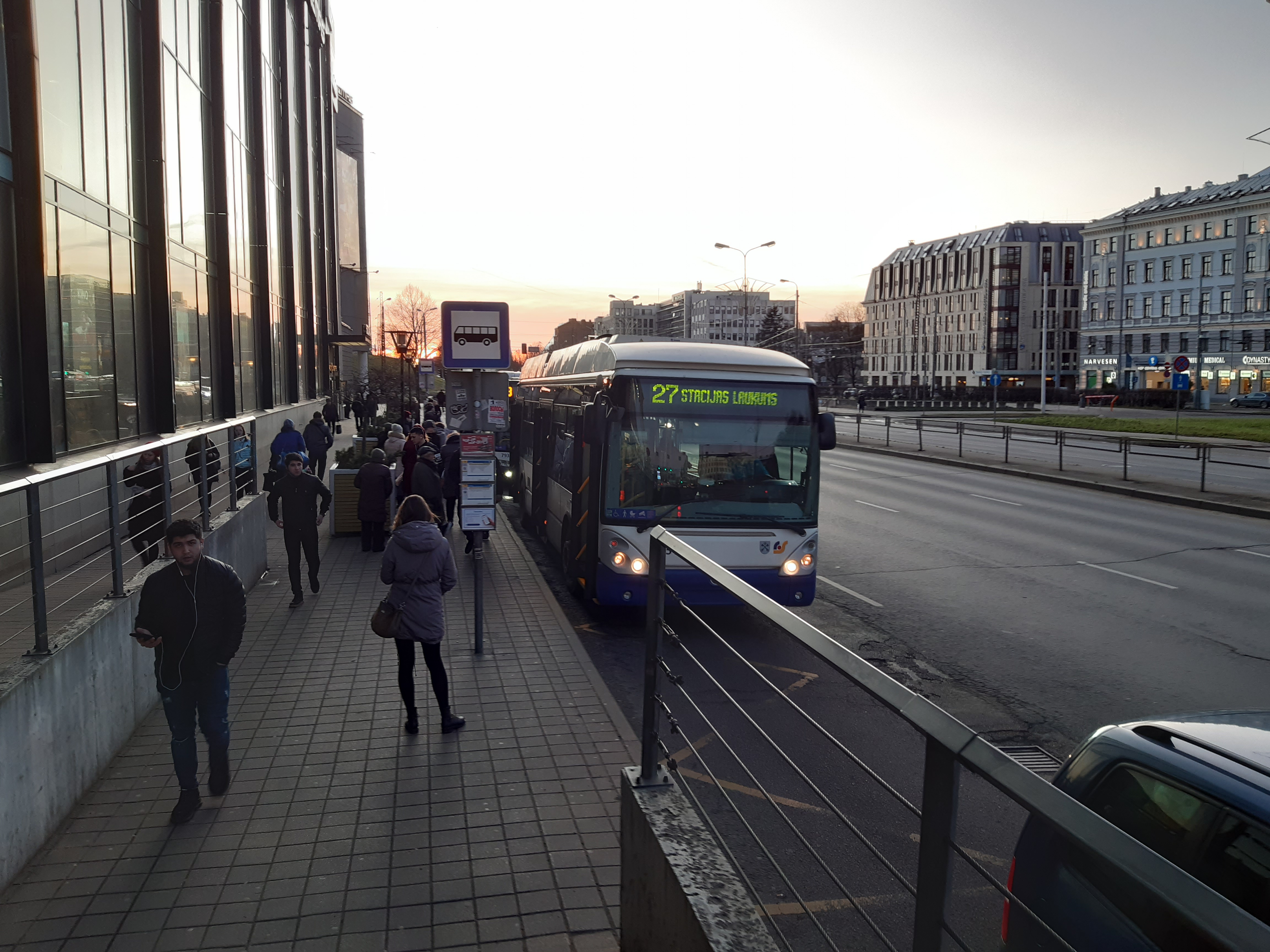 27. maršruta trolejbuss pieturvietā "Autoosta".